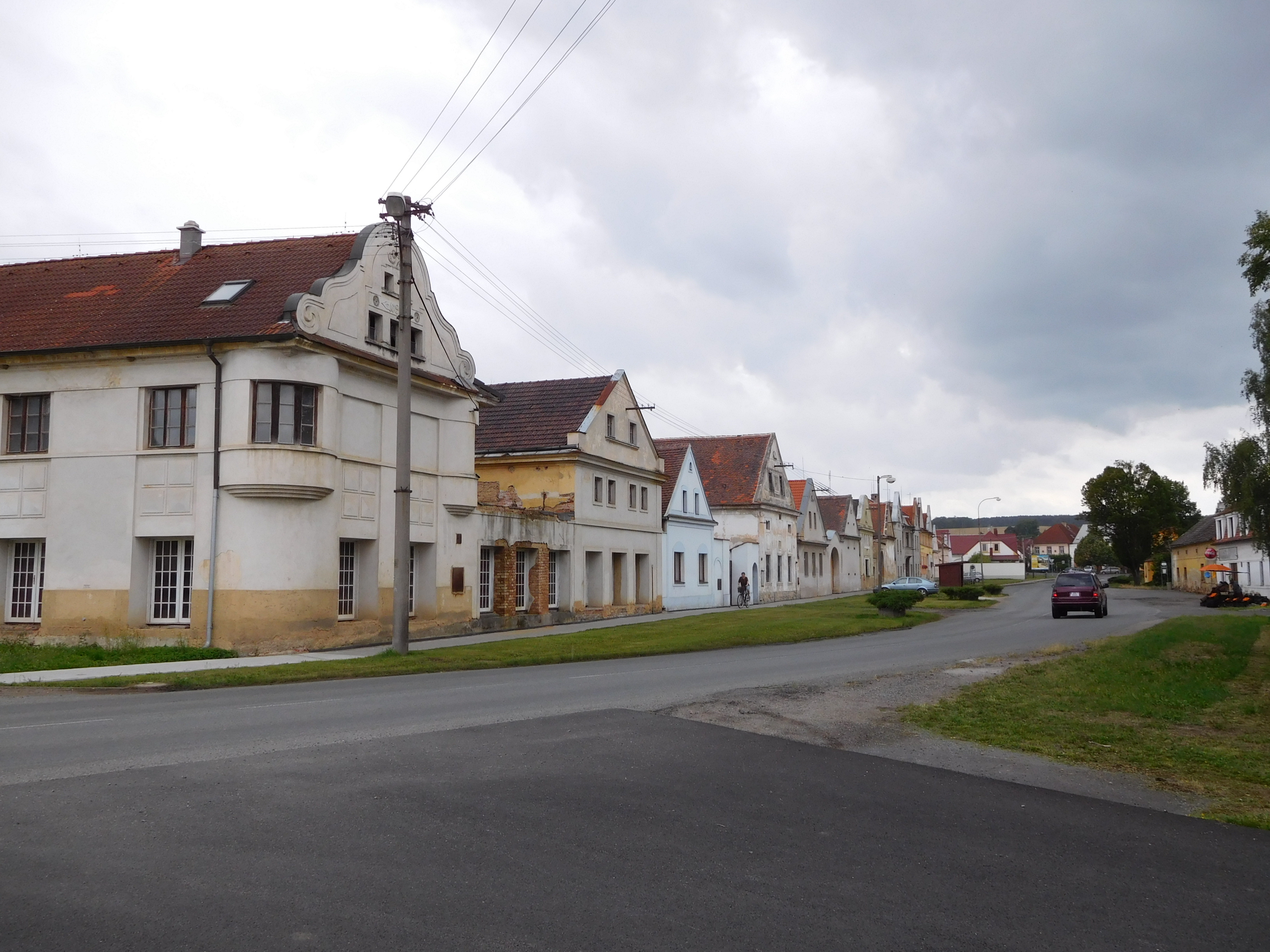 Bdeněves - náves, silnice II/605